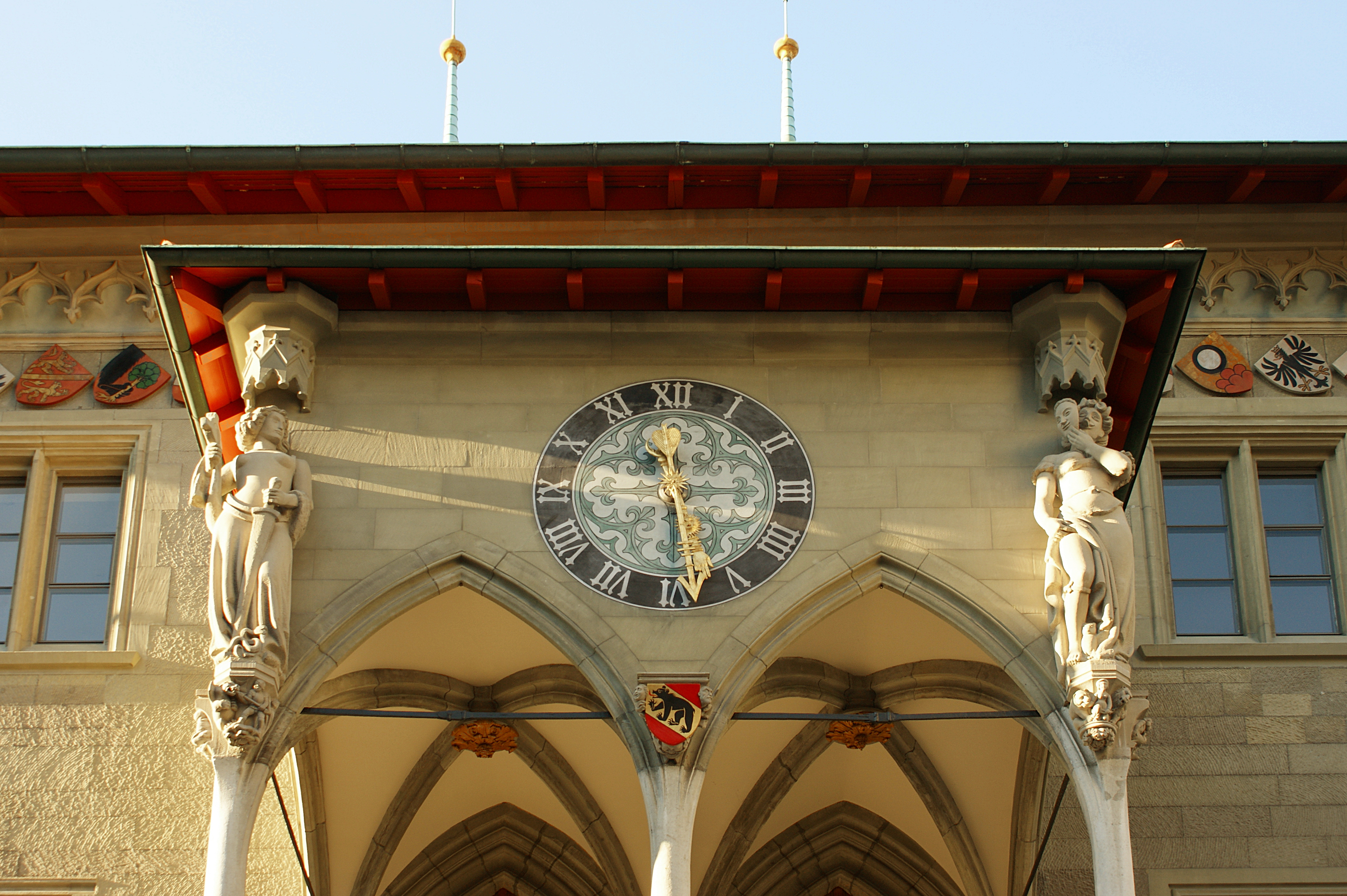 Überdeckter Mittelteil der Freitreppe Rathaus Bern